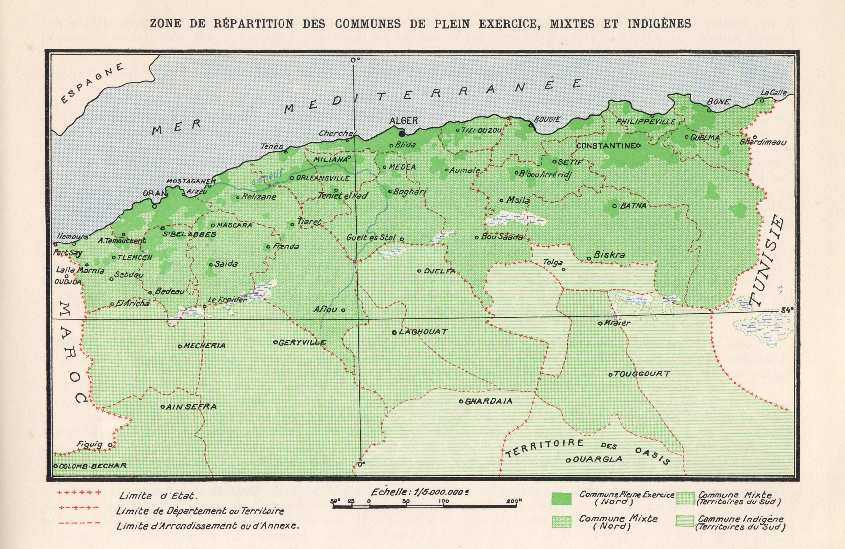 Algérie, 1934. Carte de répartition des communes de plein exercice, des communes mixtes et des communes indigènes.